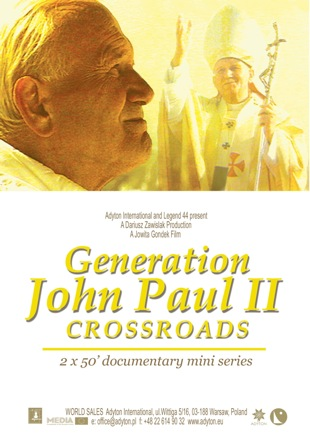 Film dokumentalny o Janie Pawle II